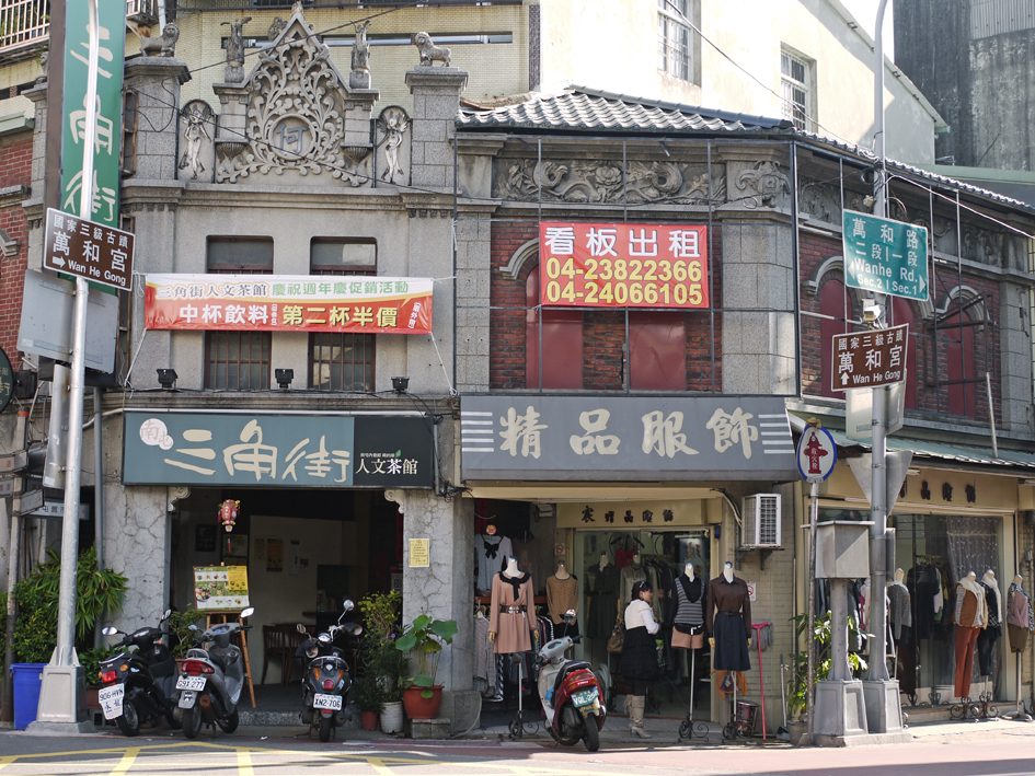 中文（台灣）: 南屯三角街。